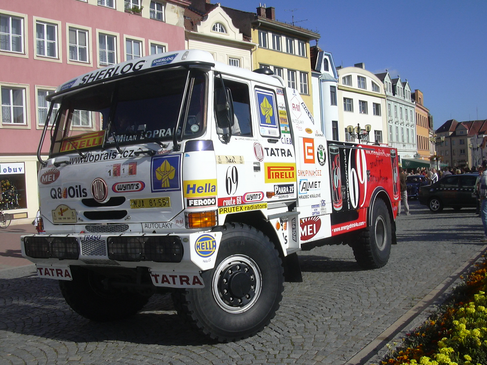 Tatra Karla Lopraise ve Vyškově